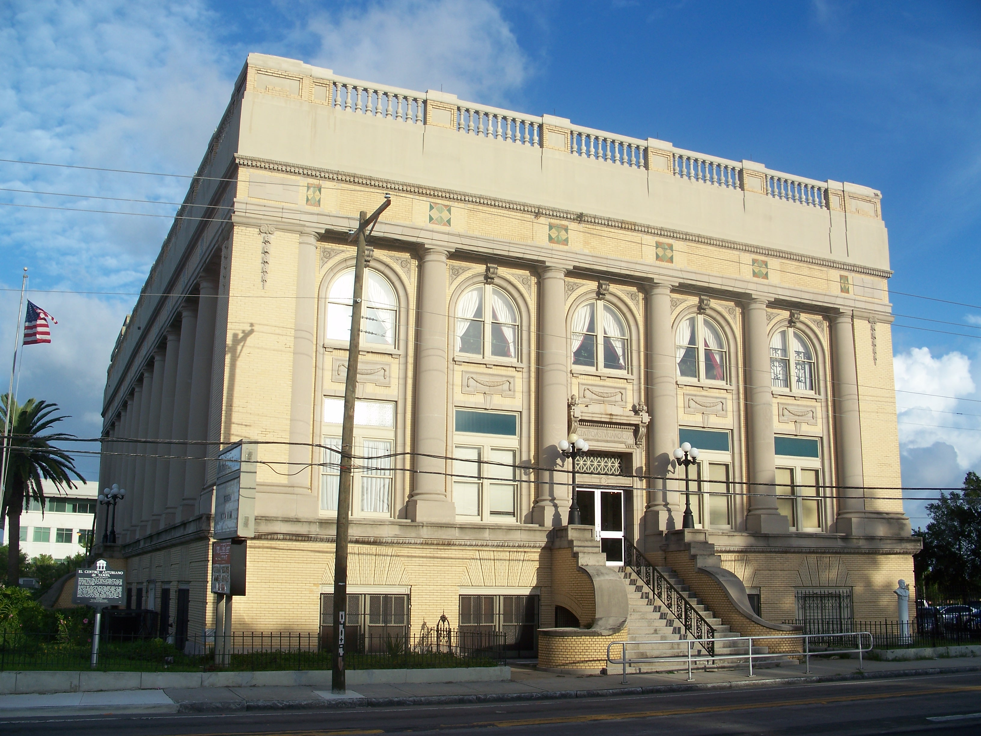 El Centro Asturiano de Tampa, in Tampa, Florida